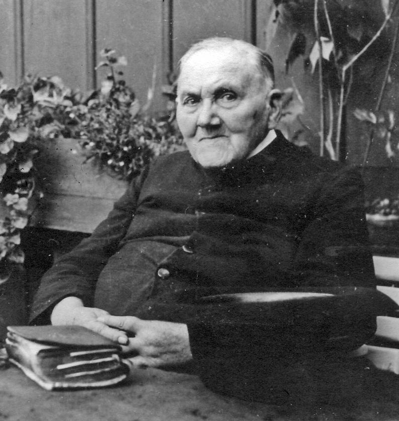 Matthias Rosemann, Dechant in Wietmarschen,*1866, gest.1961